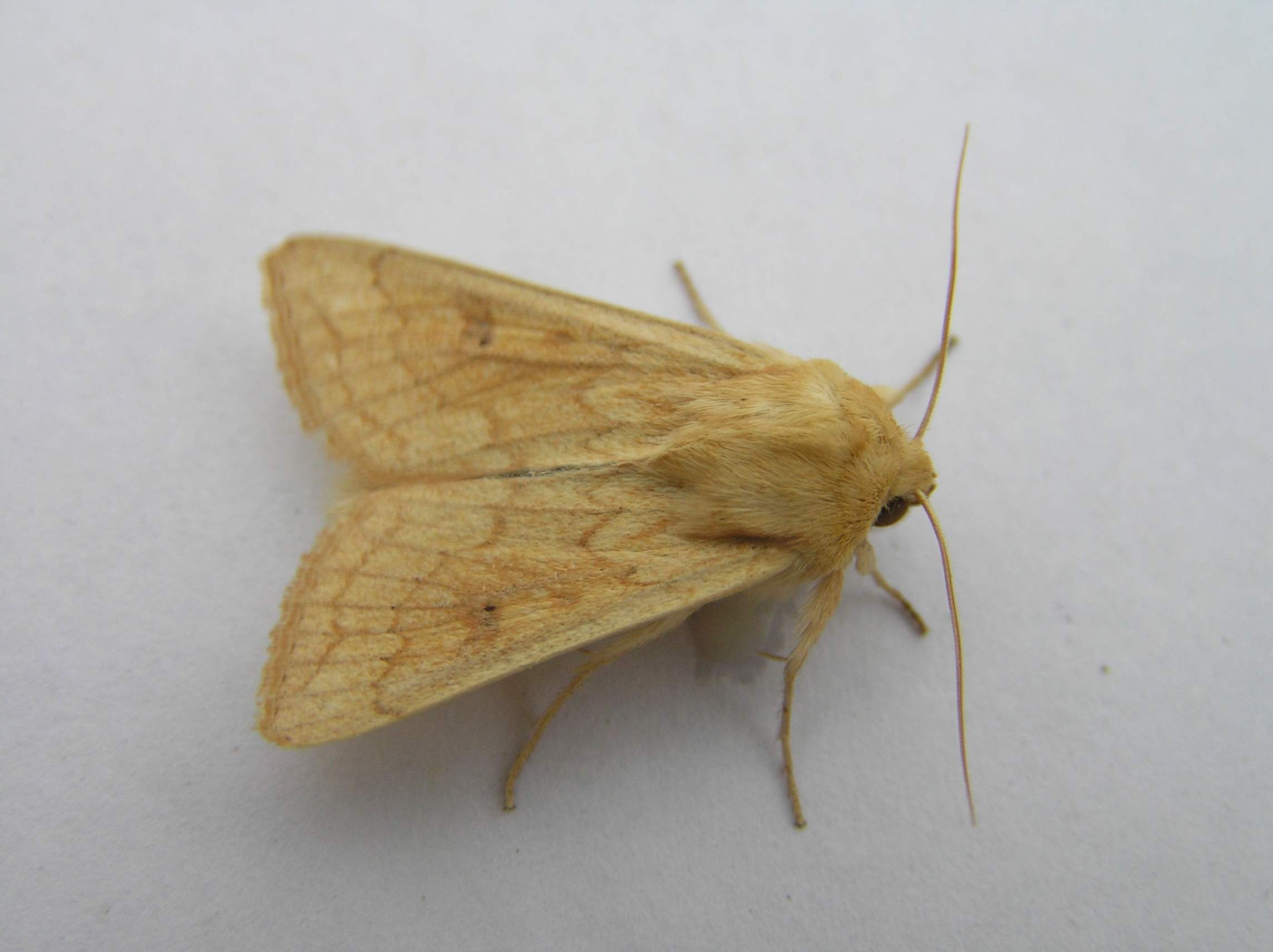 Mythimna vitellina (Zwaakse Weel, the Netherlands)